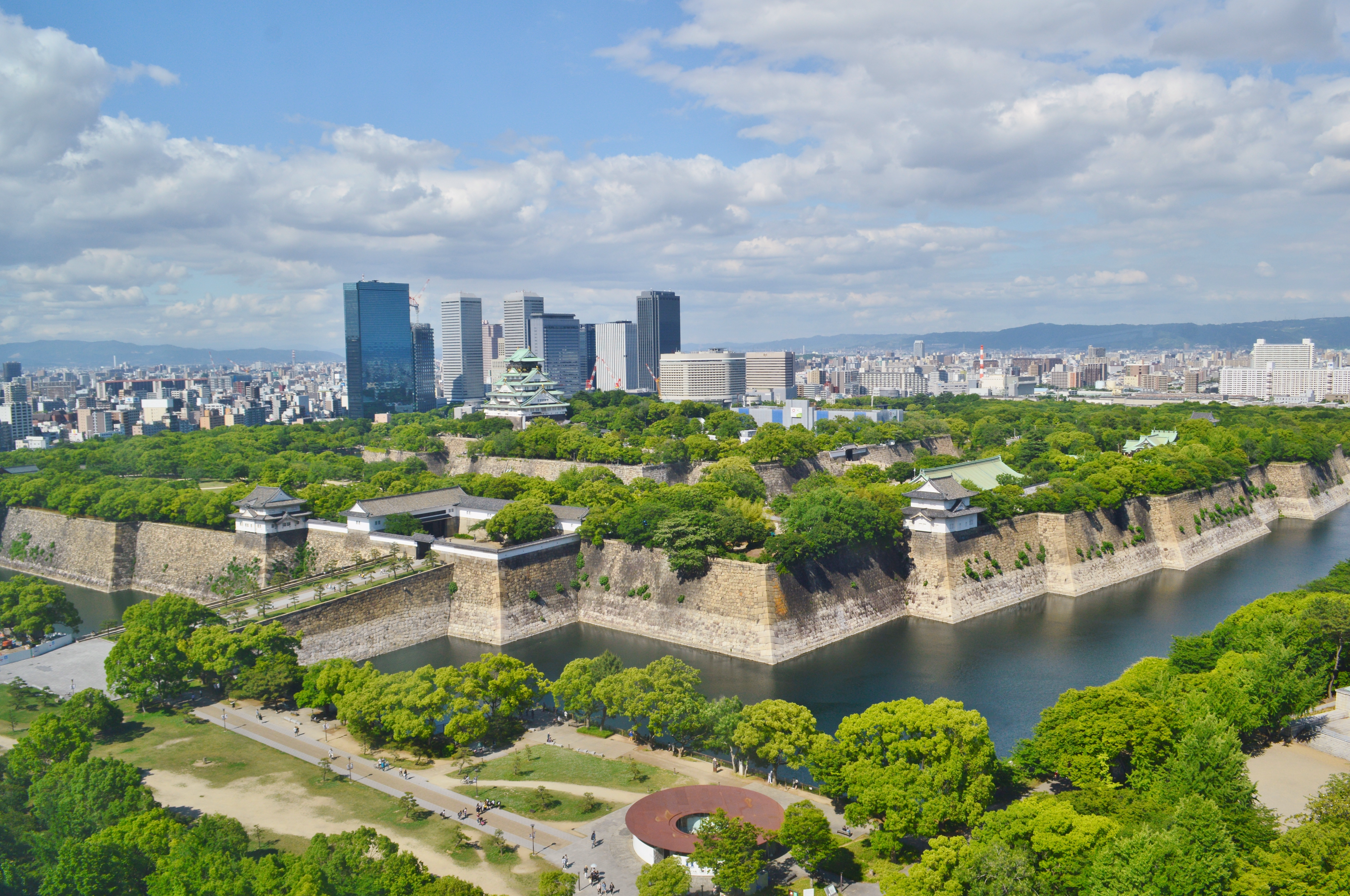 大坂城 全景